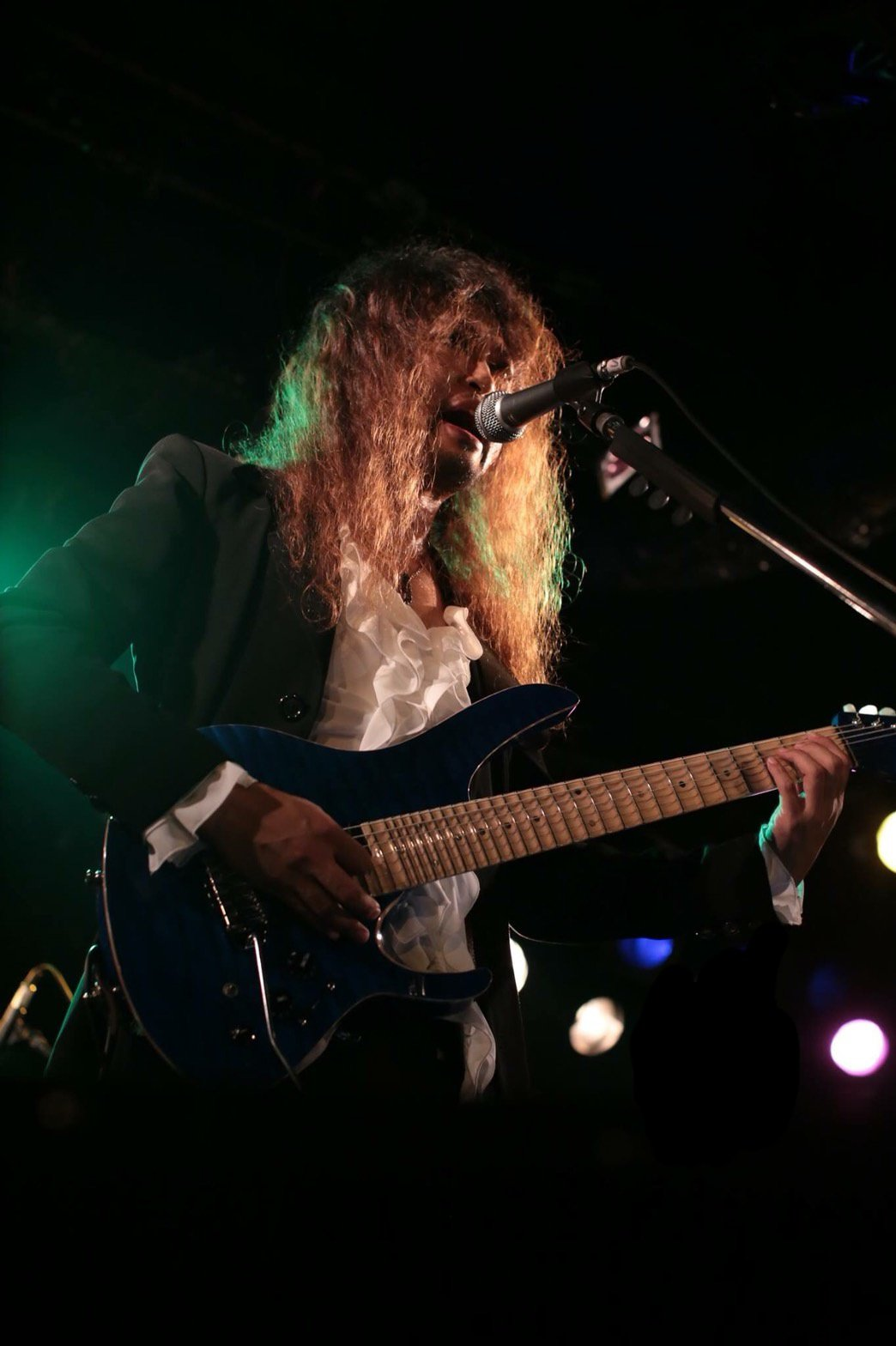 Kohey Togo 2017